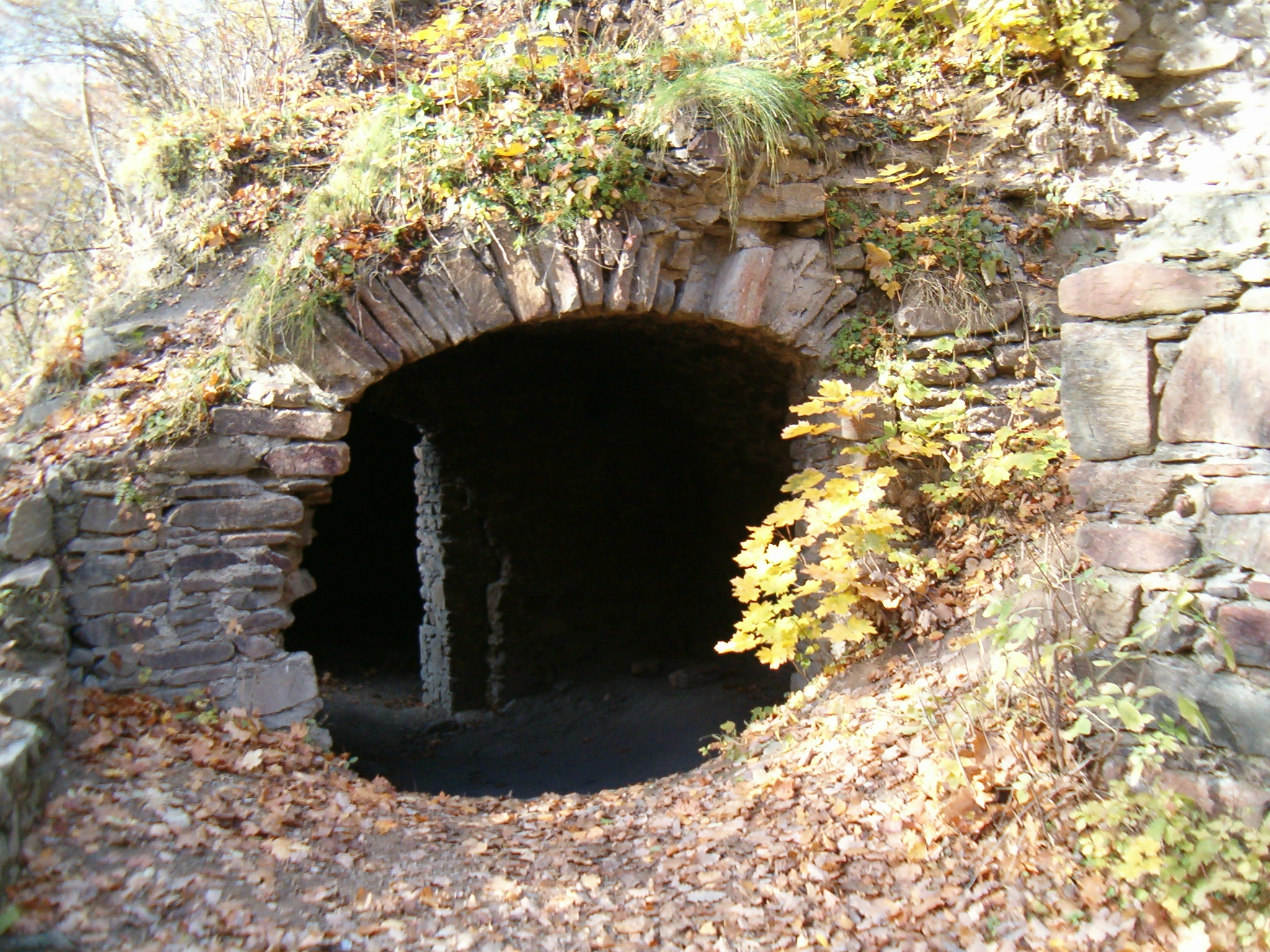 kysperk